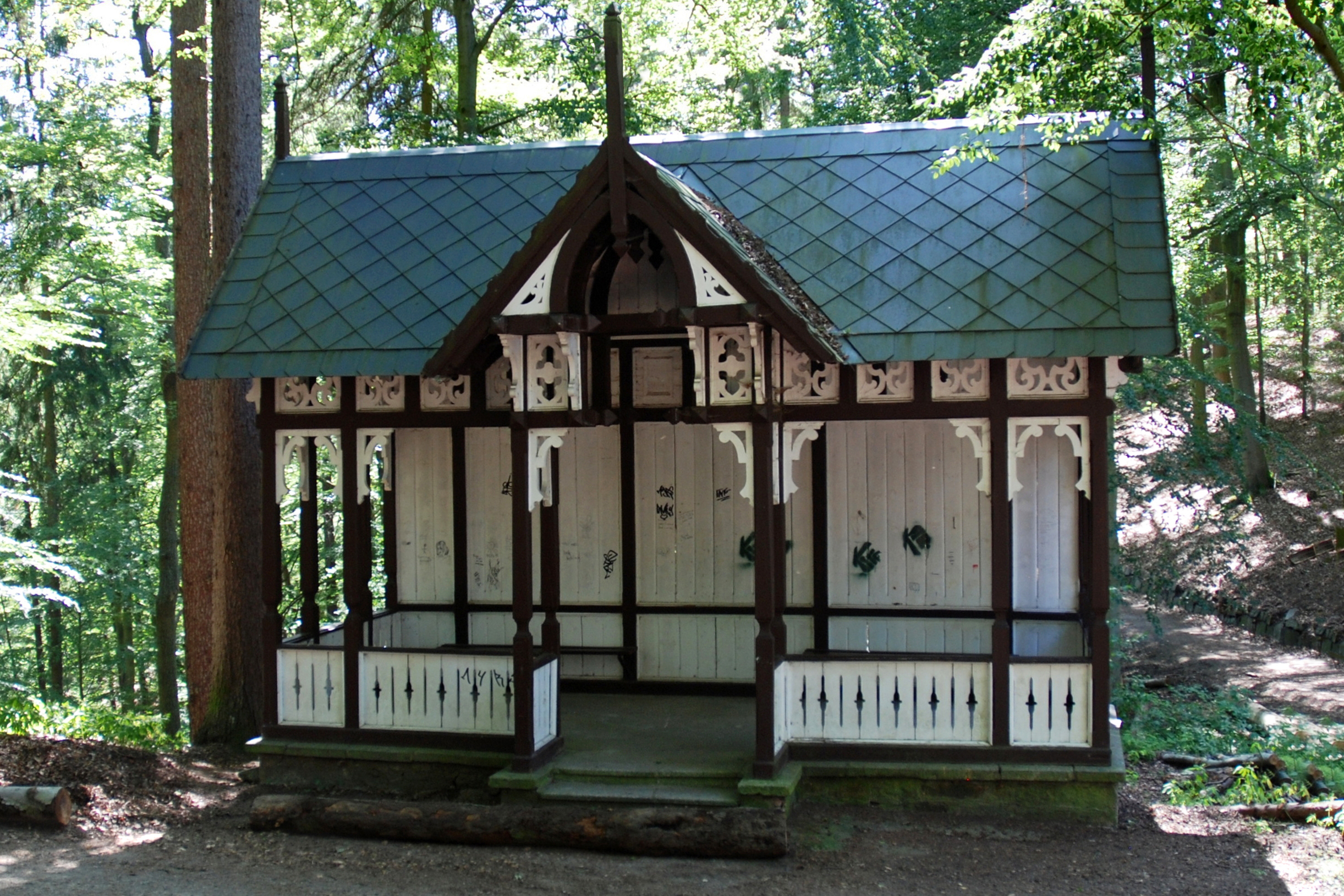 Chopinův altán v karlovarských lázeňských lesích